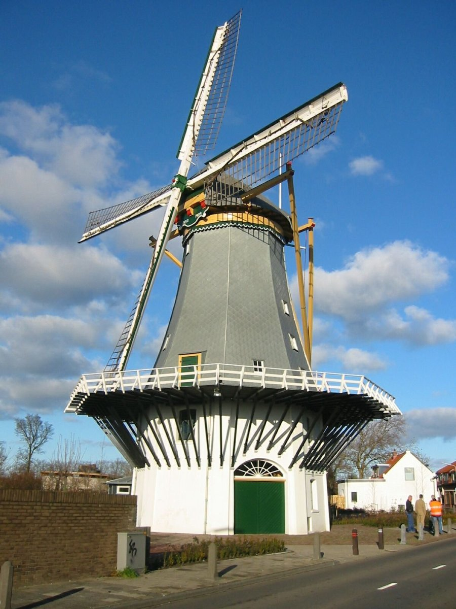 Molen van 's-Gravenzande/ Ten-Bruggencatenummer: 02773: Achtkante stellingmolen schuin van opzij gefotografeerd (opmerking: Foto gemaakt in het kader van het project Actualisering Monumentenregister (AMR).)